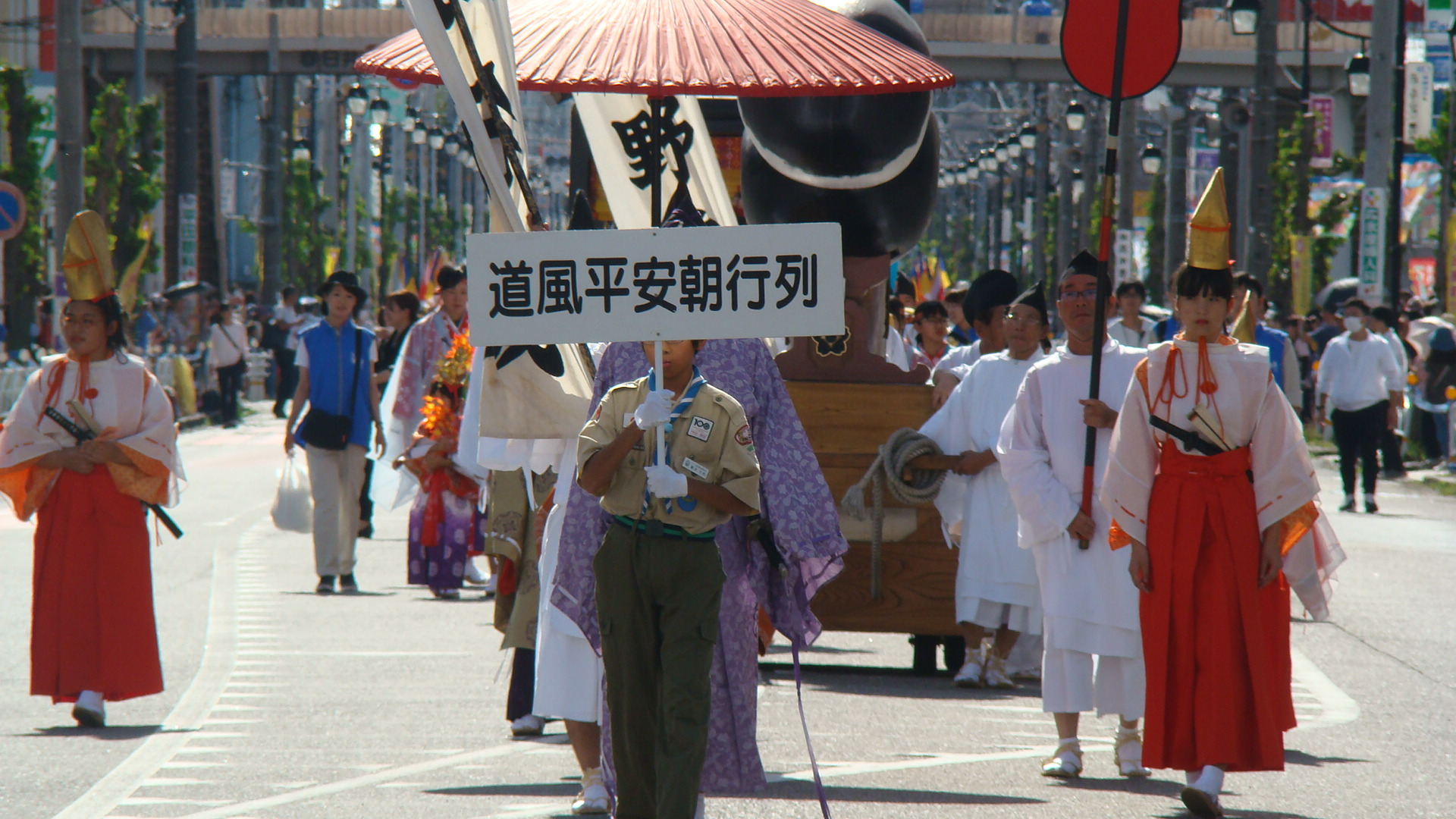 2019年10月20日の春日井まつりの道風平安朝行列の正面からの様子。